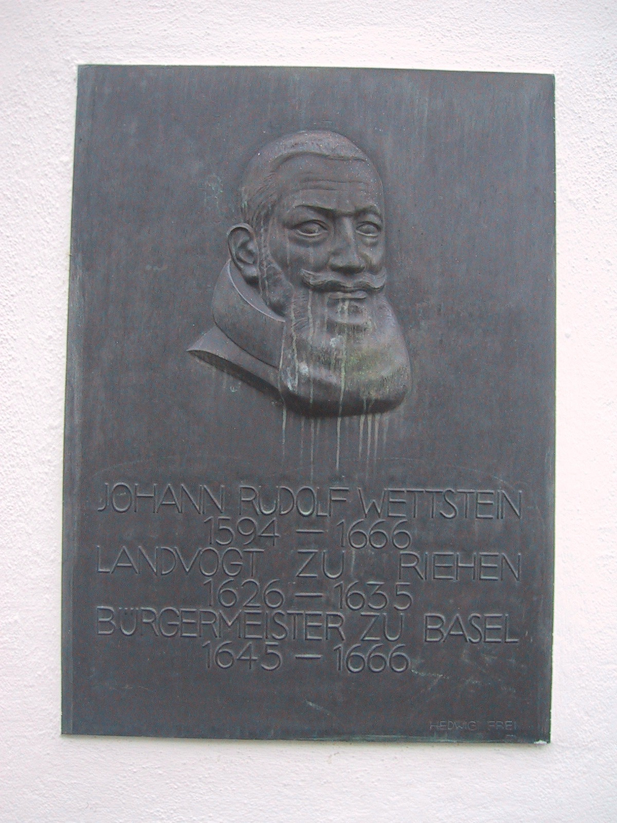 Johann Rudolf Wettstein, Bronzetafel in Riehen, Kanton Basel Stadt. Fotograf Peter Berger (selbst fotografiert)